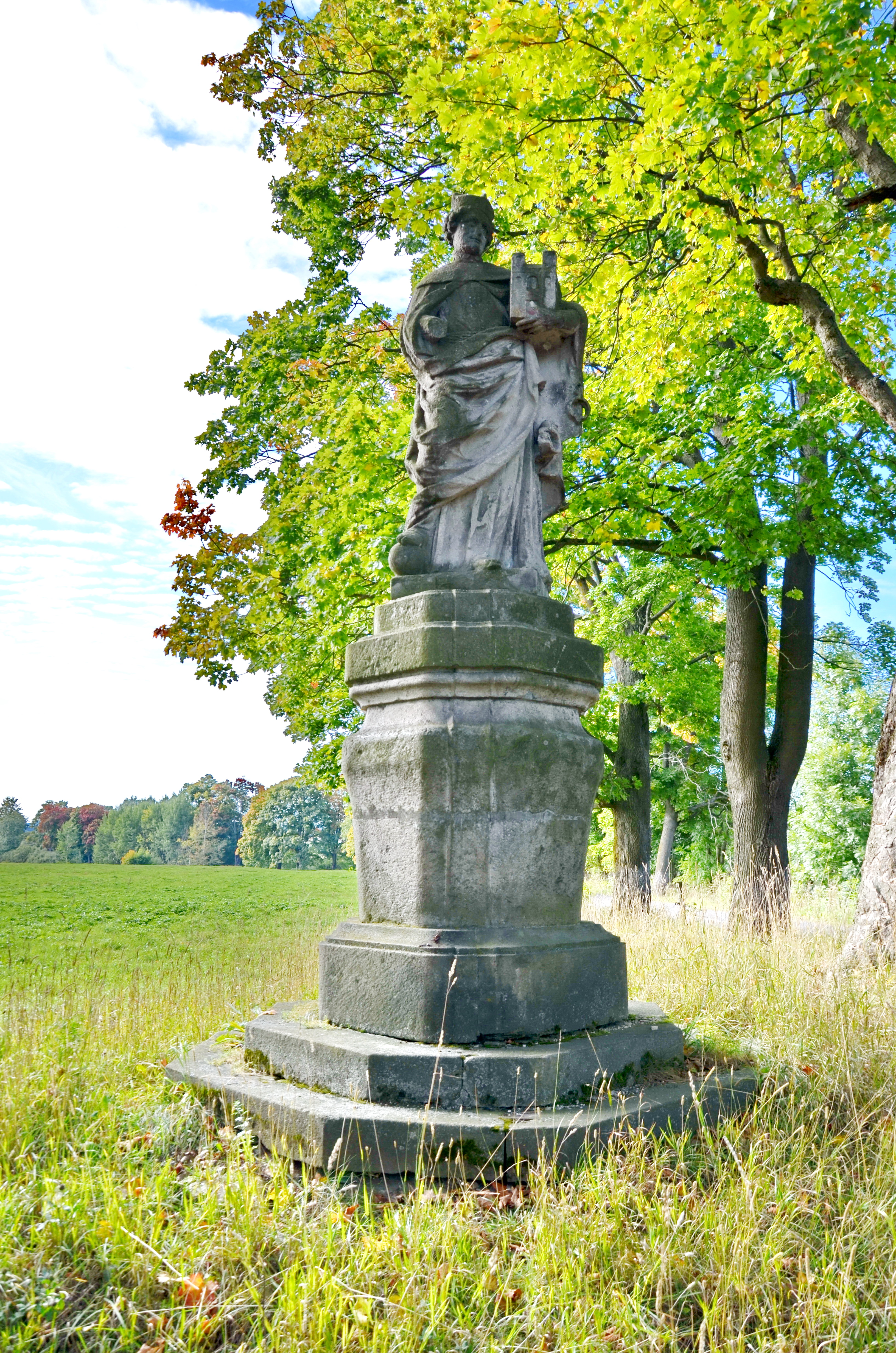 Klášter Teplá - Blahoslavený Hroznata